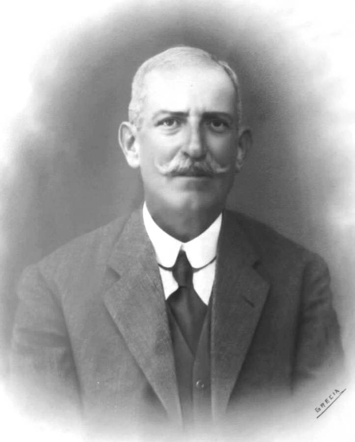 Fotografía de Adolfo Lapeira Rodríguez